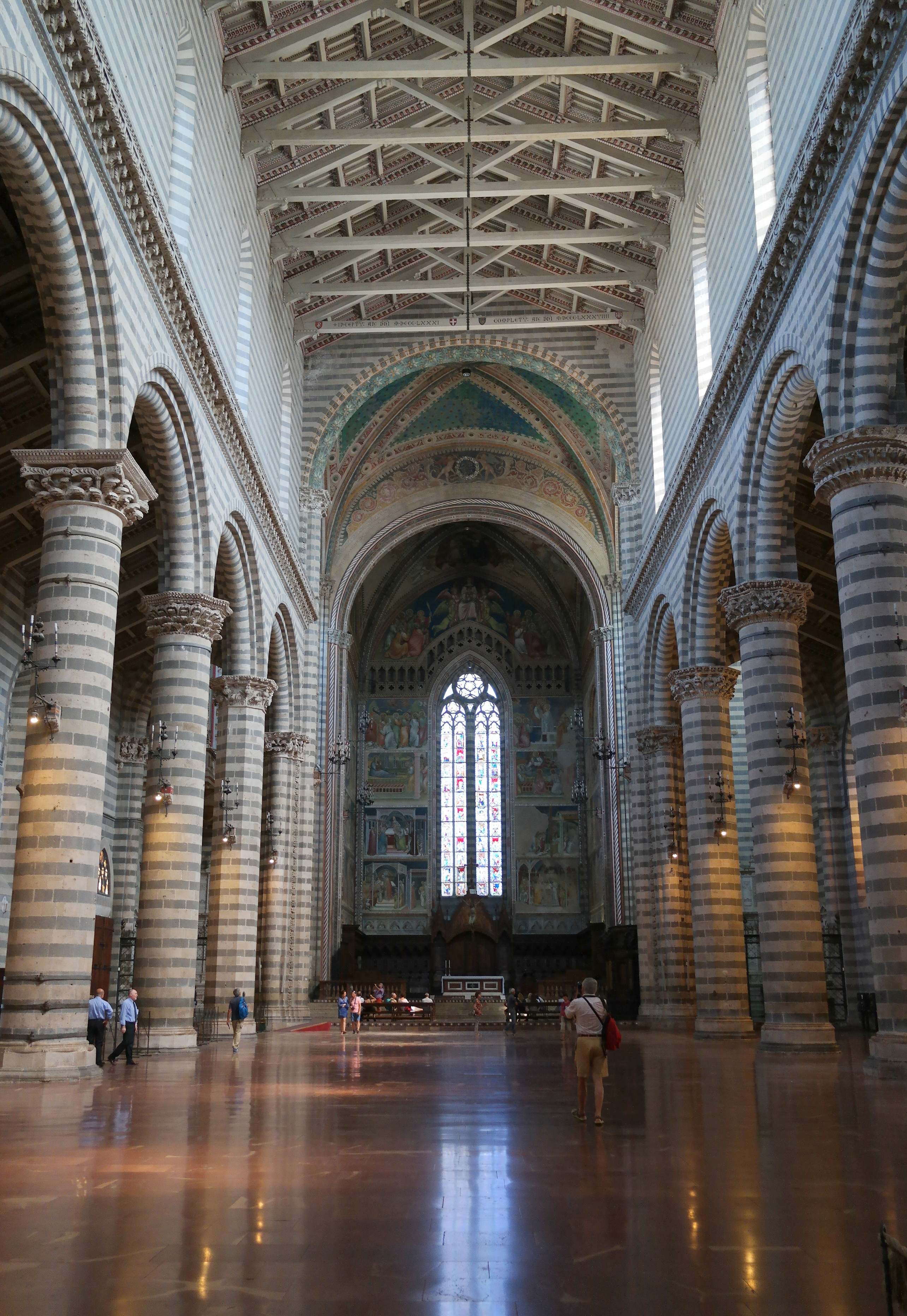 Navata centrale del Duomo di Orvieto